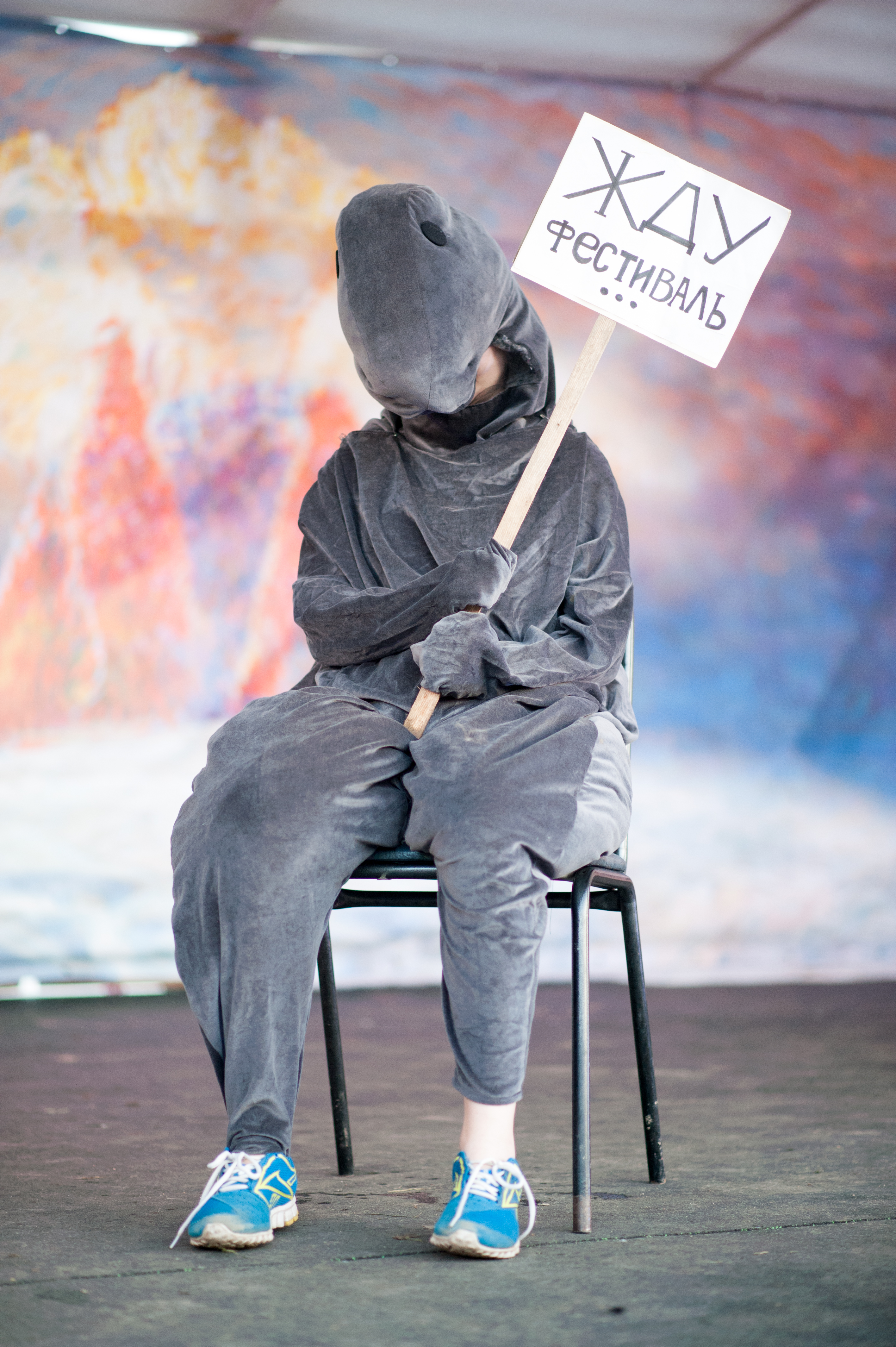 Юмористическая сценка на фестивале "Братья"